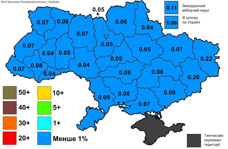 Електоральна підтримка Куйбіди Василя Степановича на виборах Президента України 2014.